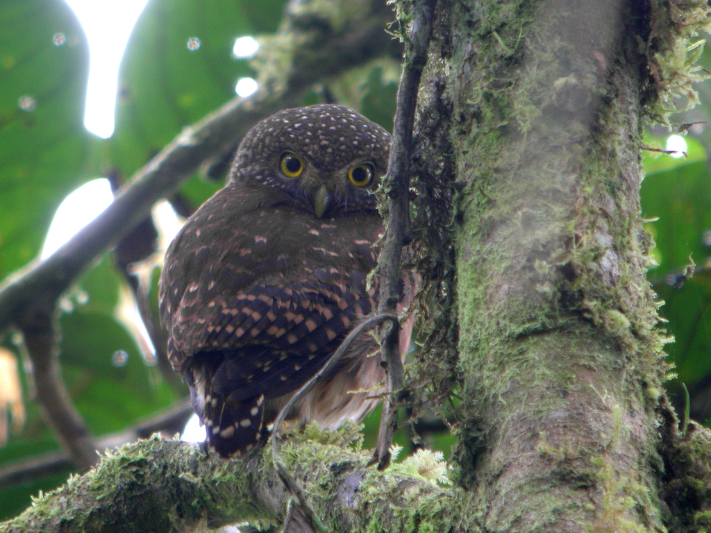 Cloud-forest Pygmy Owl Glaucidium nubicola, Tandayapa, Ecuador